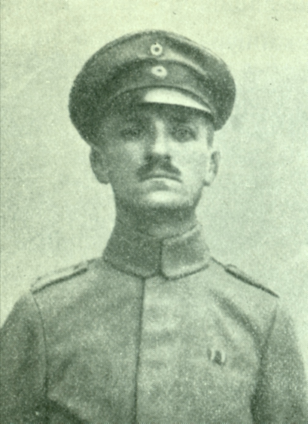 Description